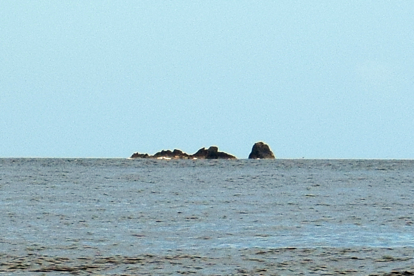 Blick auf die Felsen der Fradinhos, von den Ilhéus das Cabras aus gesehen.